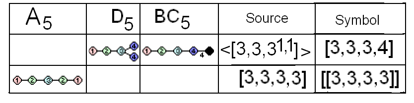 Coxeter-Dynkin diagram